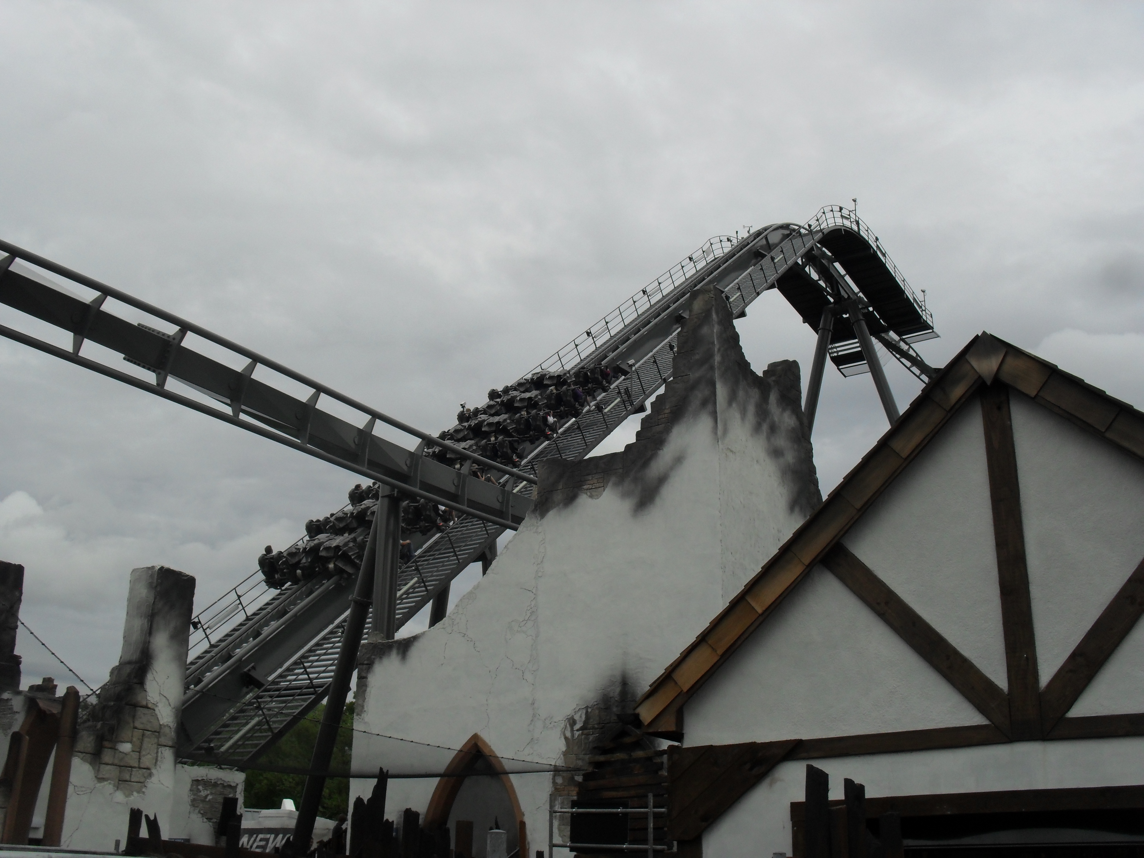 Le lift hill de The Swarm, à Thorpe Park